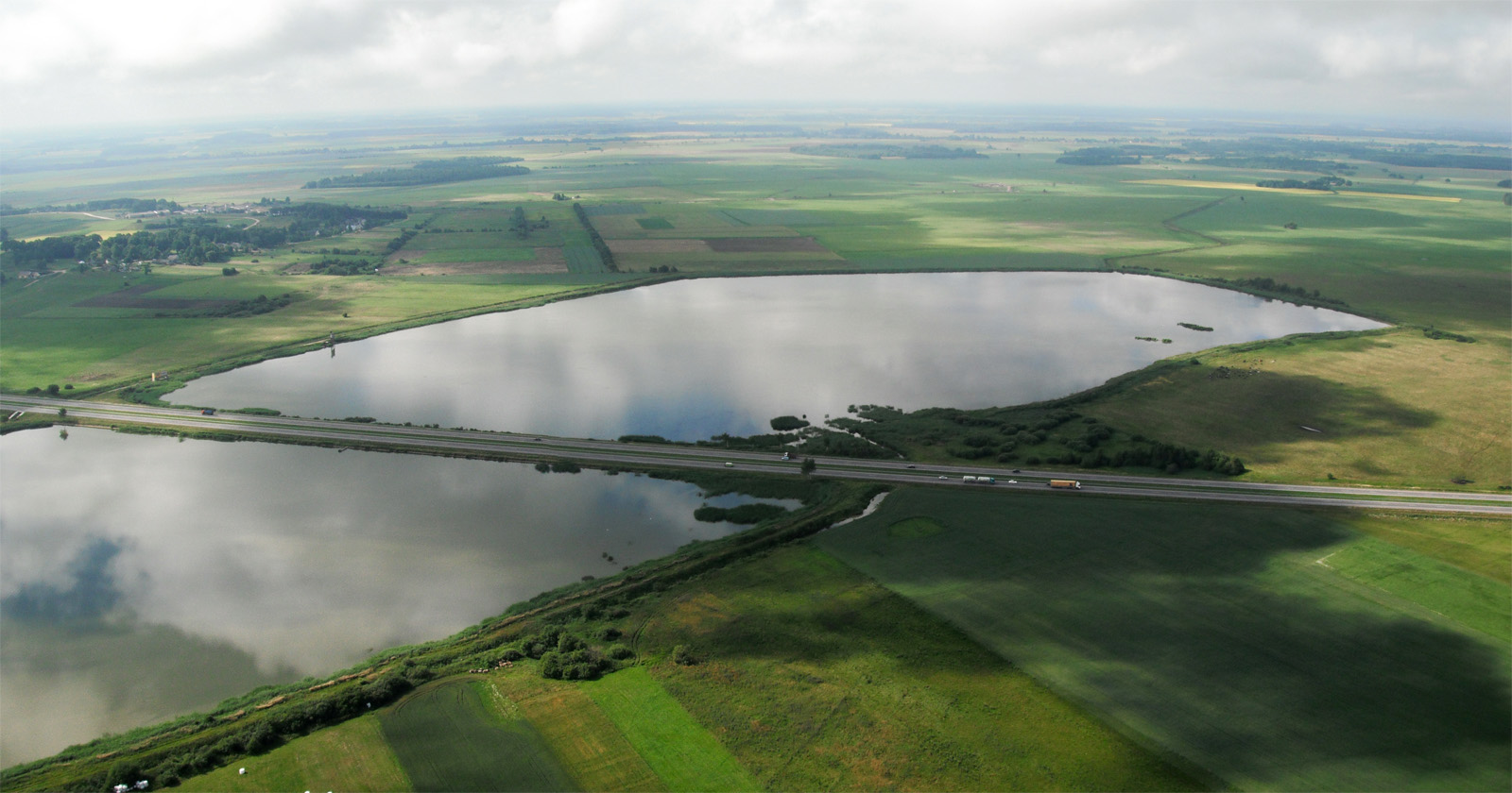 Gabšių tvenkiniai